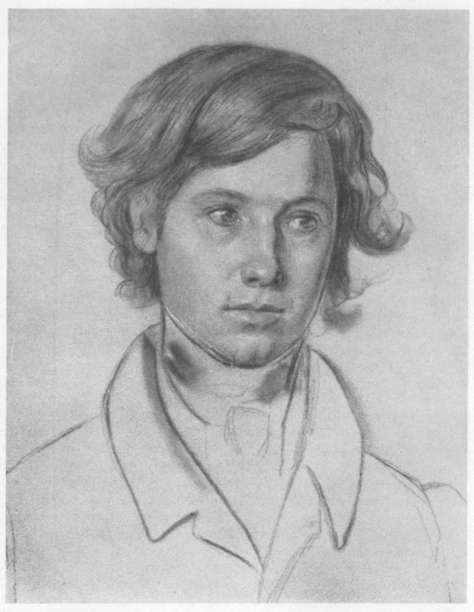 Bildnis eines jungen Mannes (Beschreibung lt. Quelle)